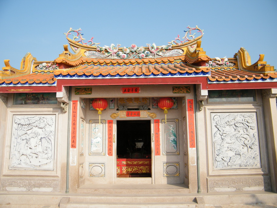 西墩村珍珠娘娘庙